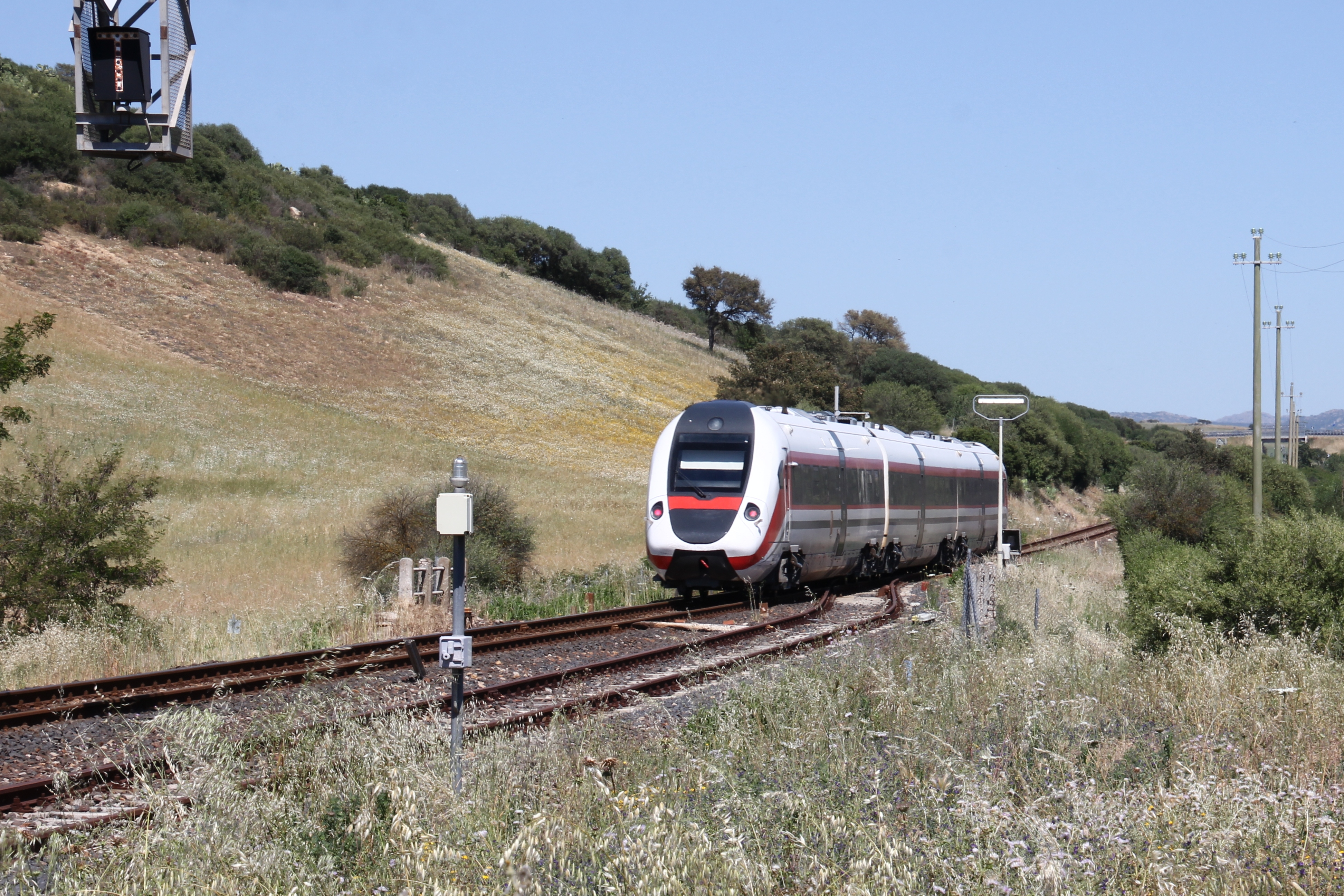 Autotreno ATR 365